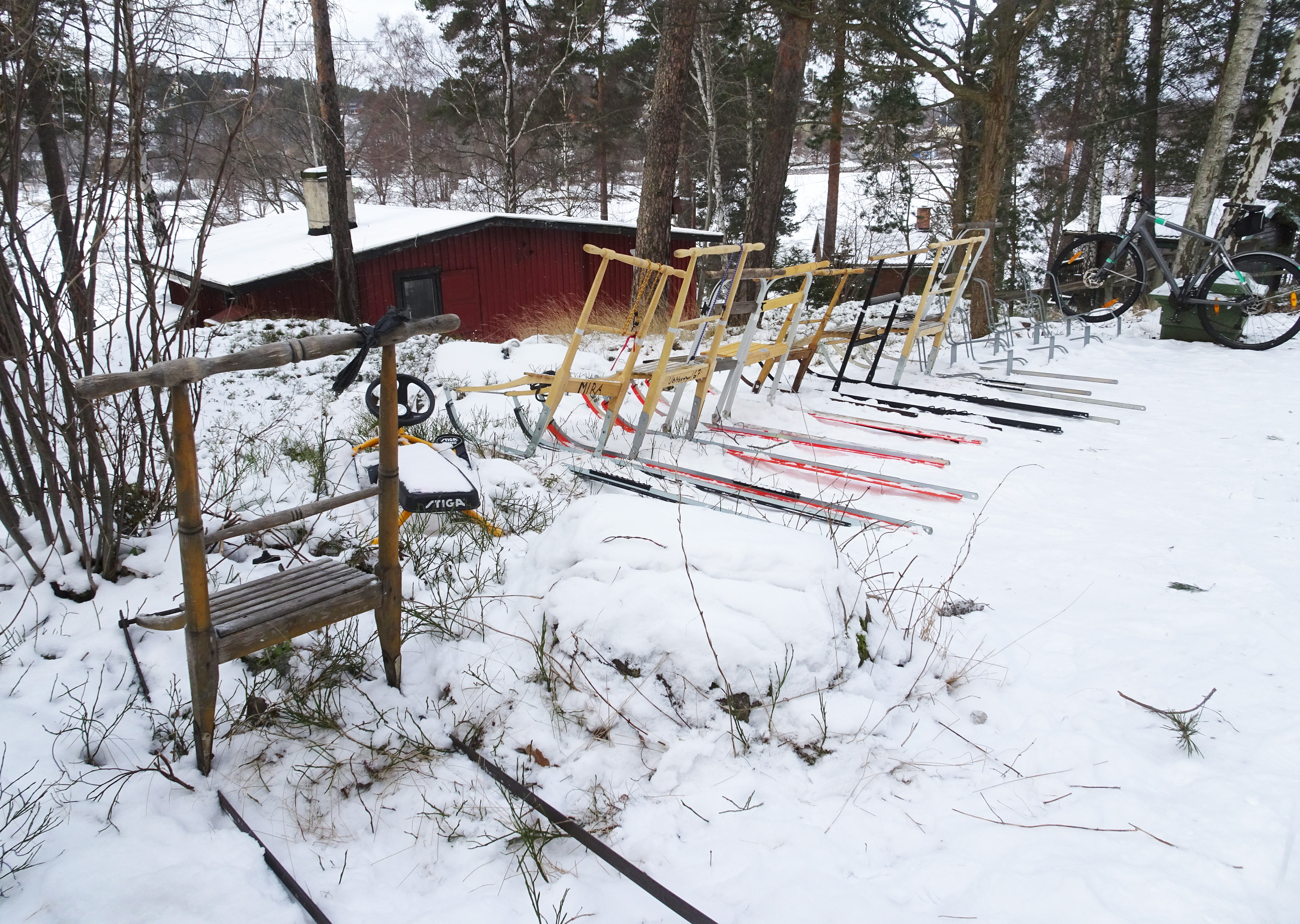 P-plats för sparkar på Tranholmen